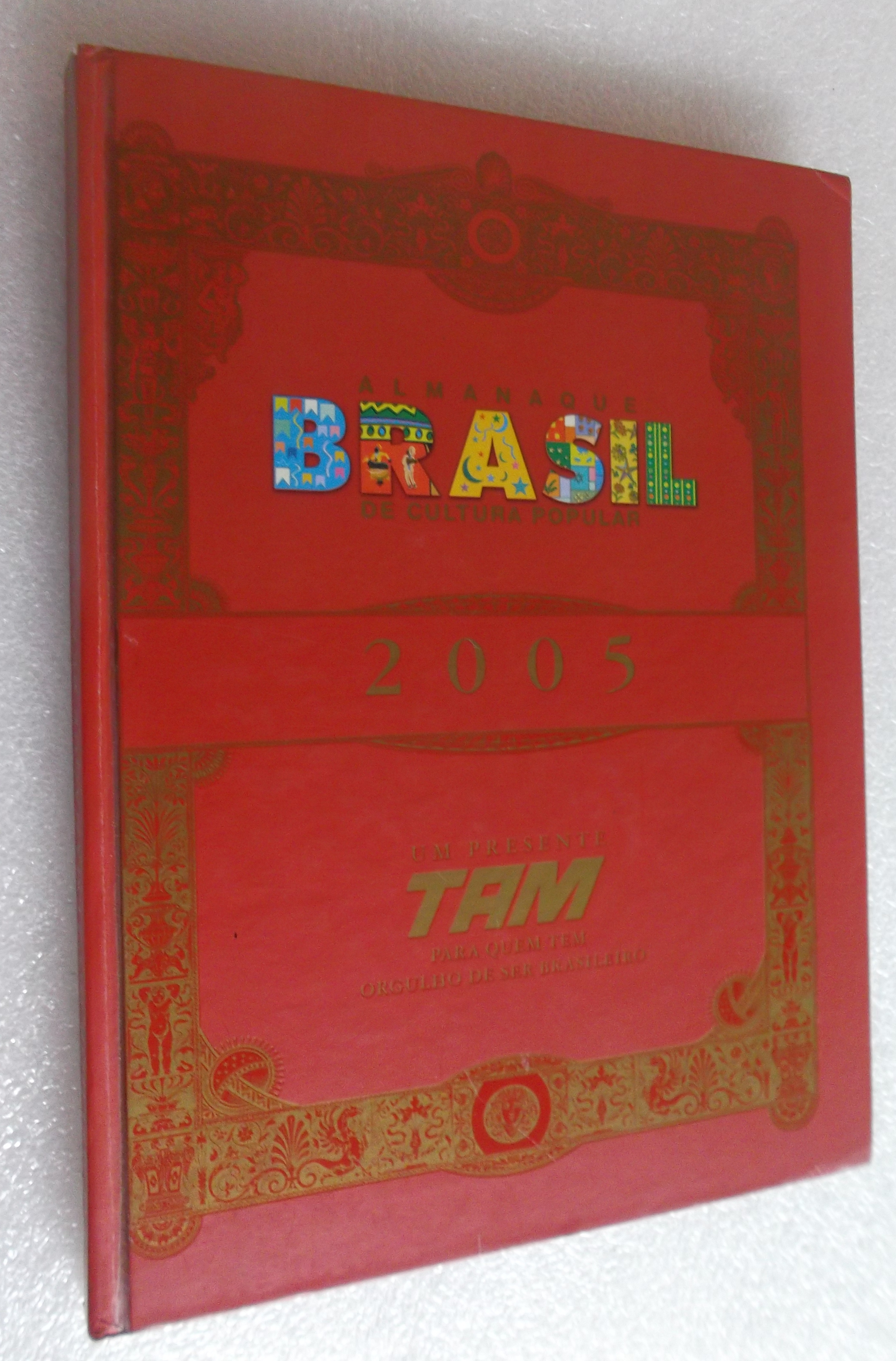 Encadernado com edições de 2005 do Almanaque Brasil de Cultura Popular.